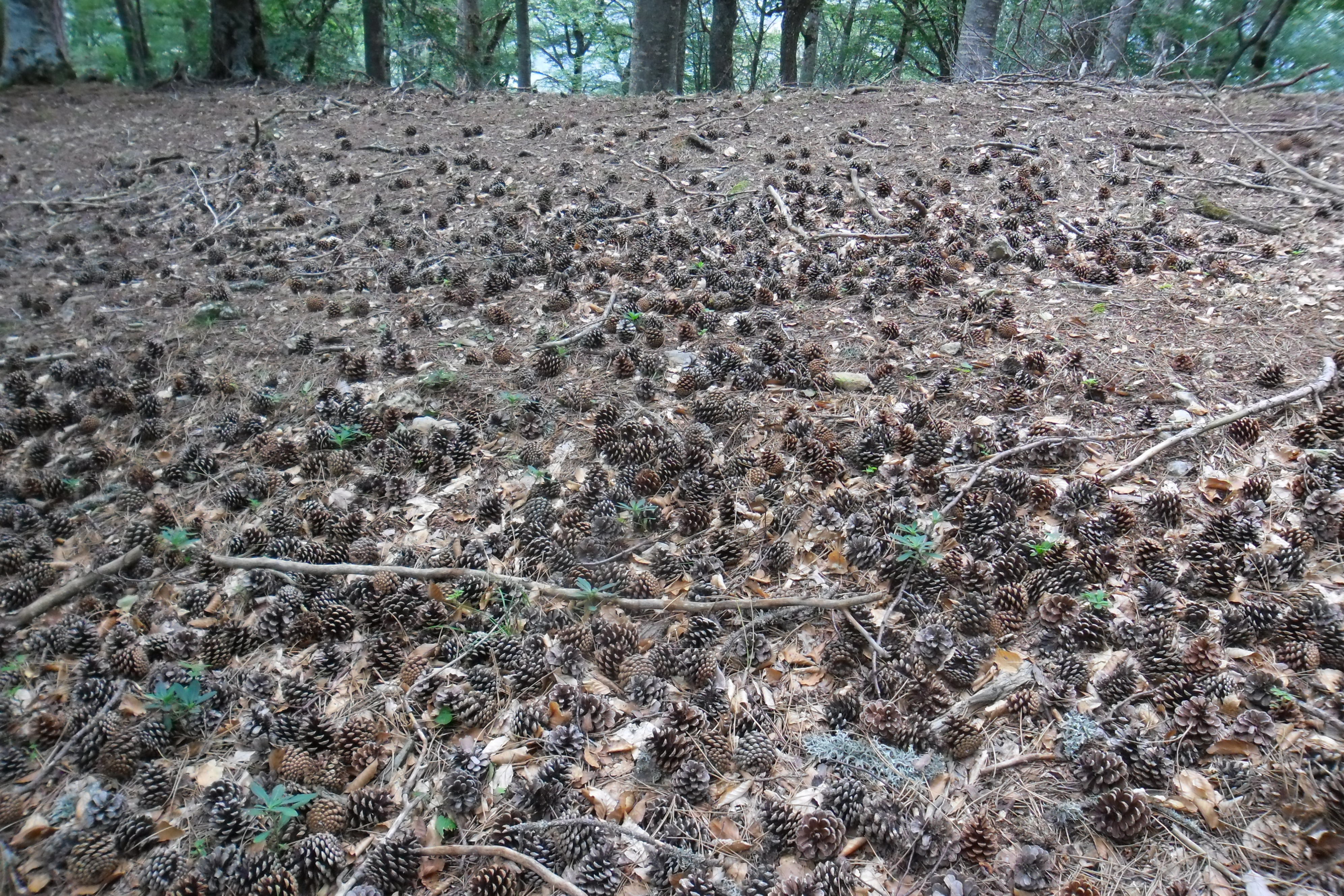 Фото